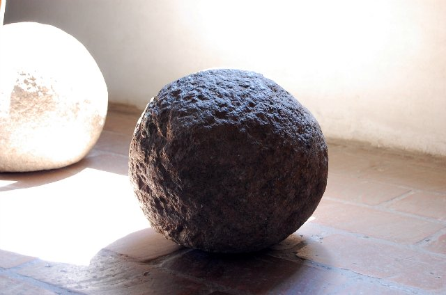 Мірскі замак. Ядры.